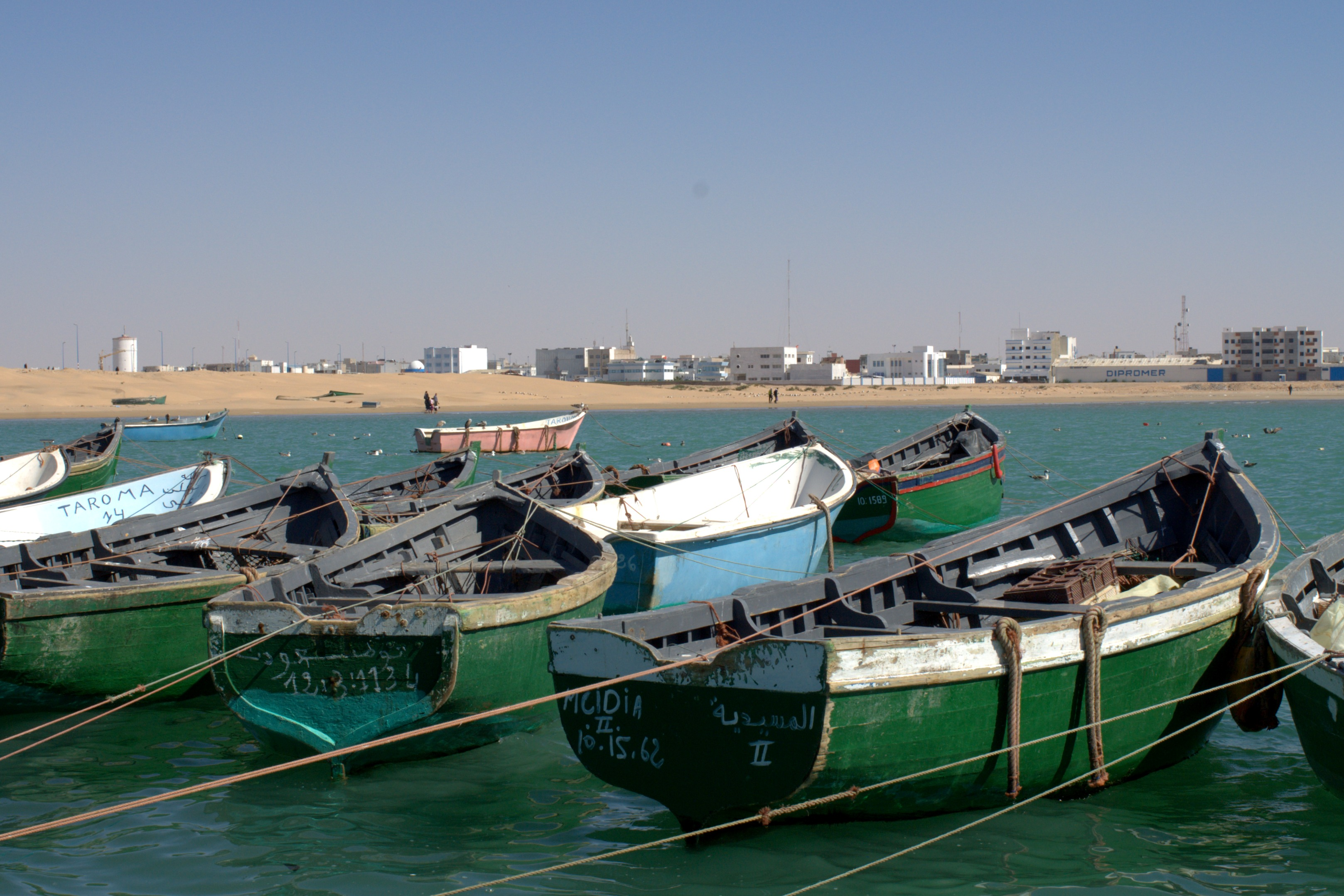 Vista del puerto de El Aaiún